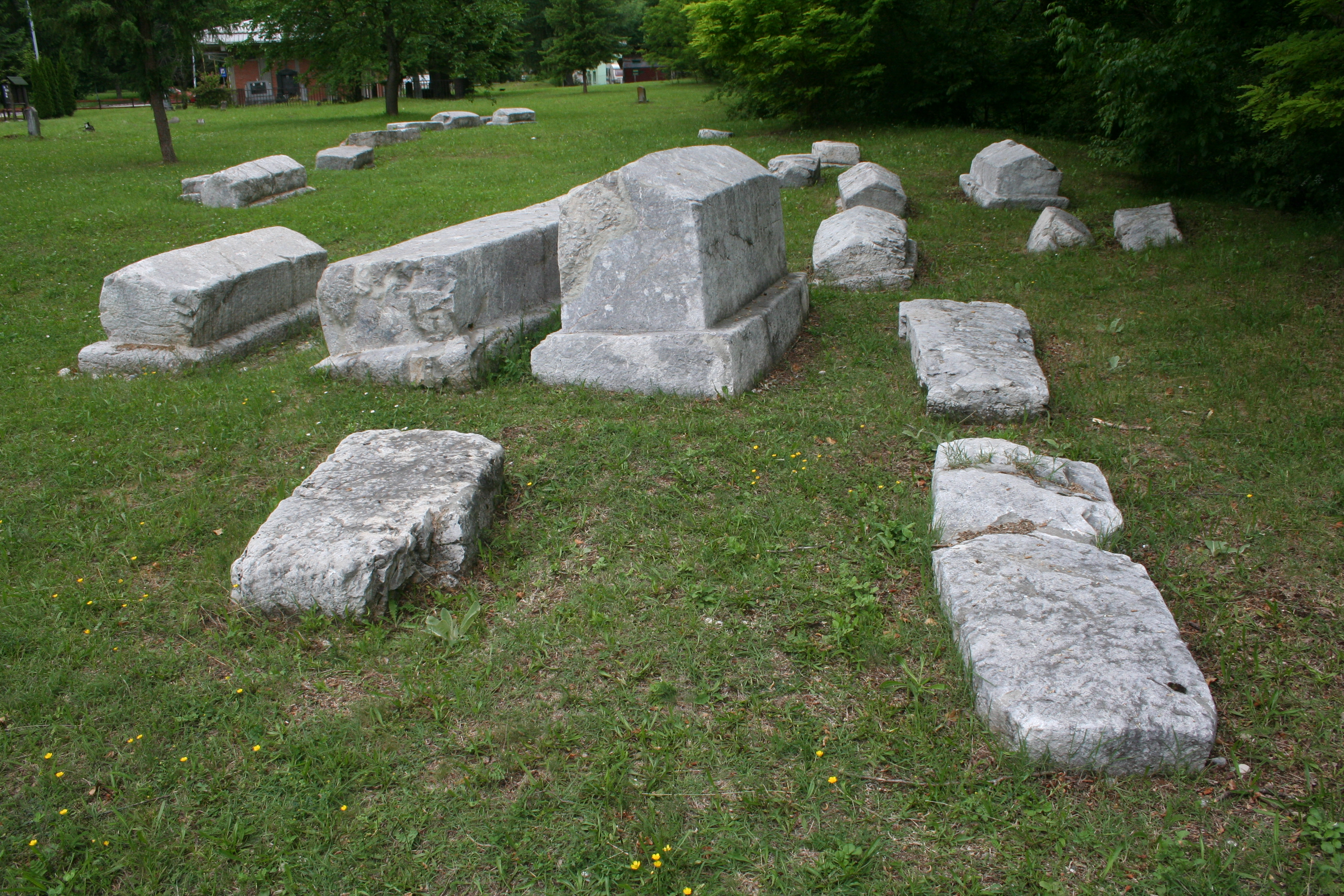 Mramorje u Perućcu